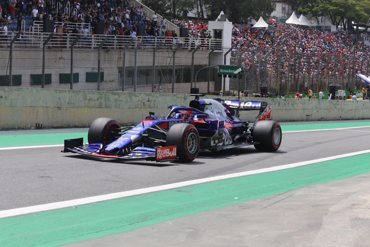 Governador do Estado de São Paulo, João Doria, durante Grande Prêmio do Brasil de F1 2019. Local: São Paulo/SP. Data: 17/11/2019